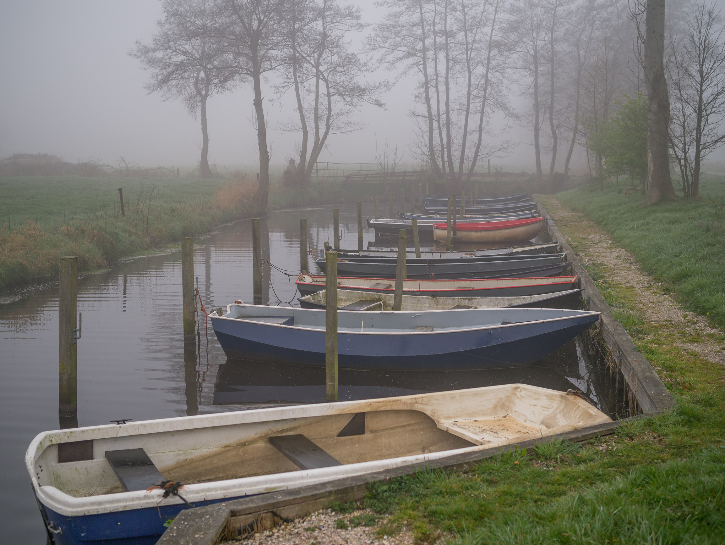 Haventje van de Tike